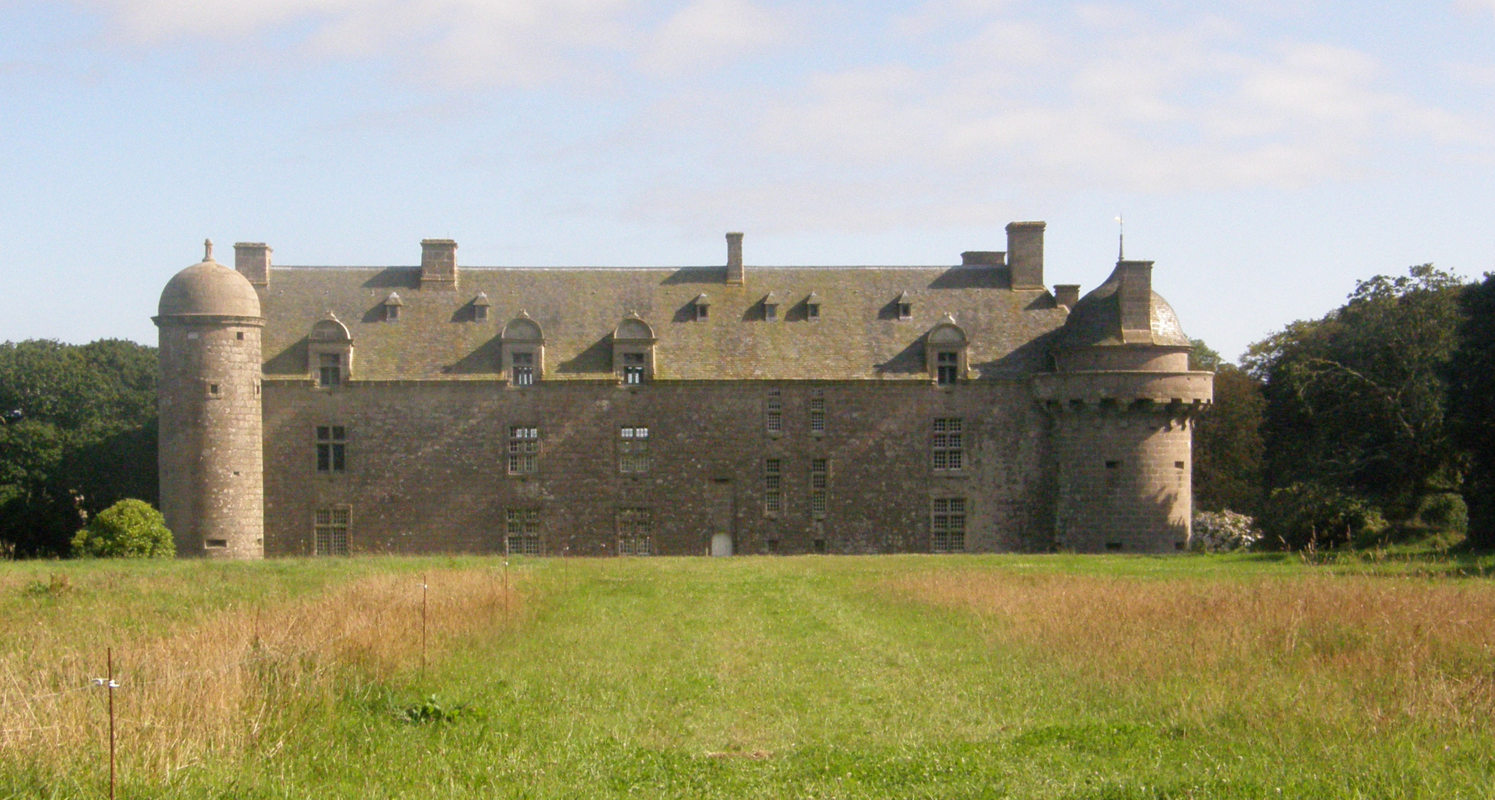 L'arrière du château de Kergroades en BRELES